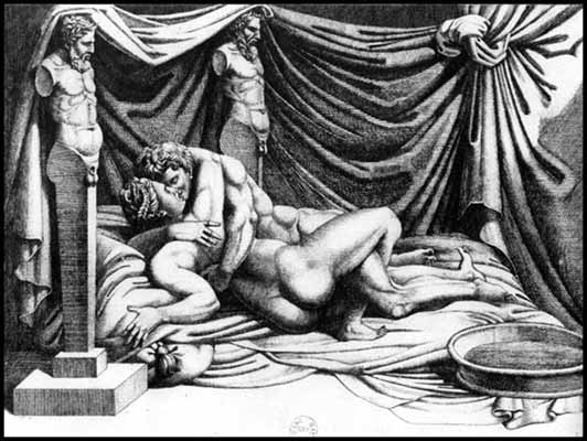 I modi. Original by Marcantonio Raimondi